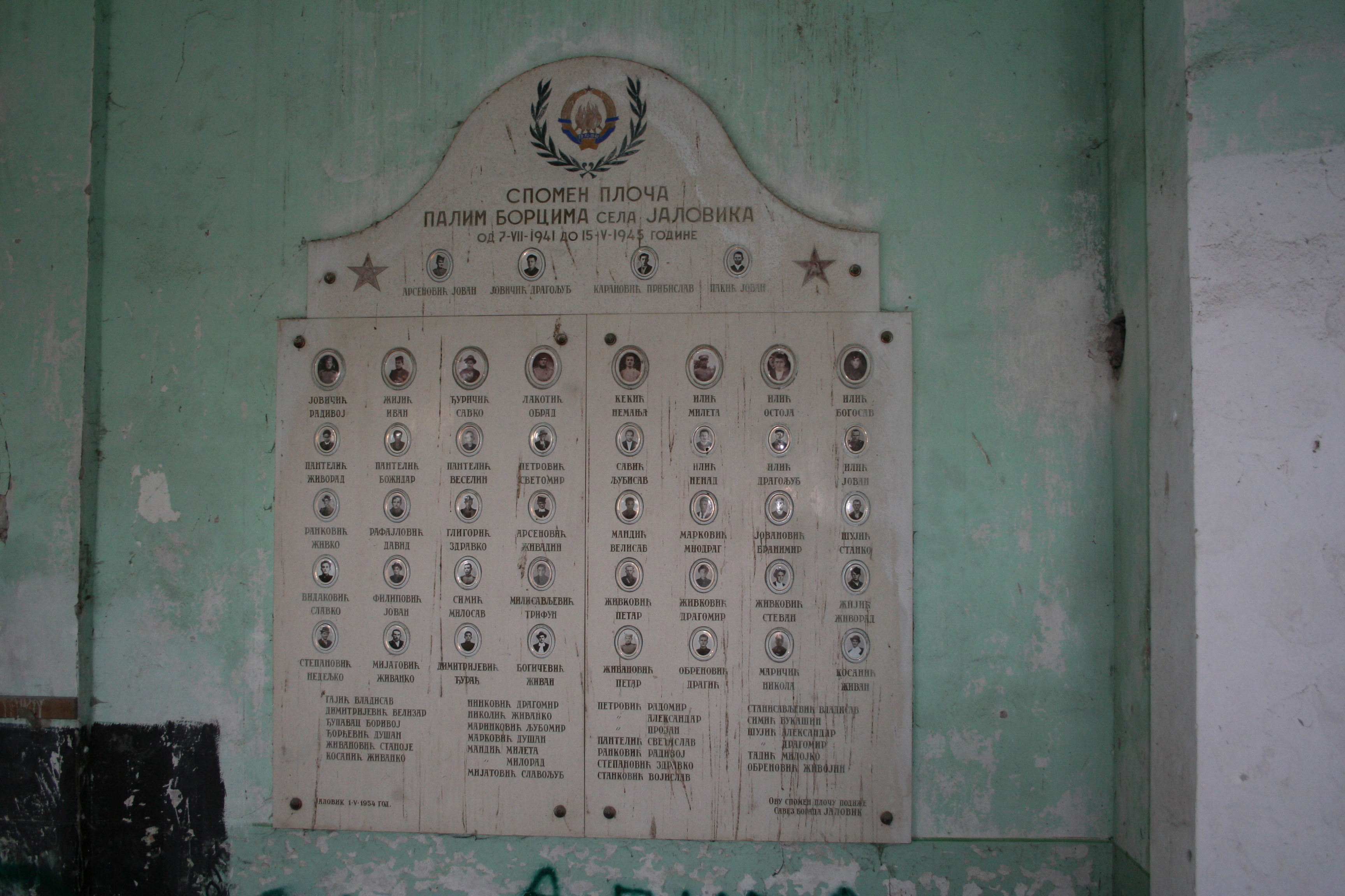 Spomen ploča palim borcima u sali Doma u Jaloviku, opština Vladimirci